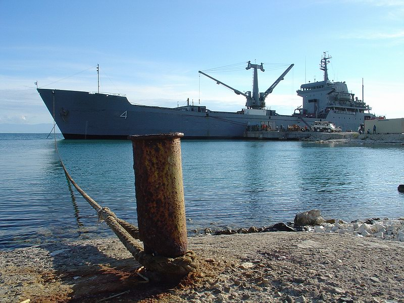 El Transporte A.R.A. "BAHÍA SAN BLAS" descargando ayuda humanitaria argentina en su única entrada al Puerto Privado de Gonaïves el 22 de noviembre de 2005. Es una foto similar, pero aquí esta vista desde otra perspectiva, a la que se publicara por una contribución que efectué, con mis correspondientes derechos, en el siguiente link